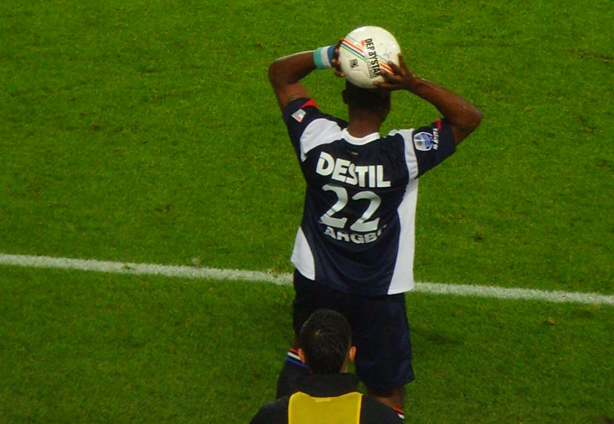 Ibrahim Kargbo, Sierra Leoons profvoetballer, tijdens een uitwedstrijd van Willem II tegen FC Utrecht - OpenStreetMap(Info)